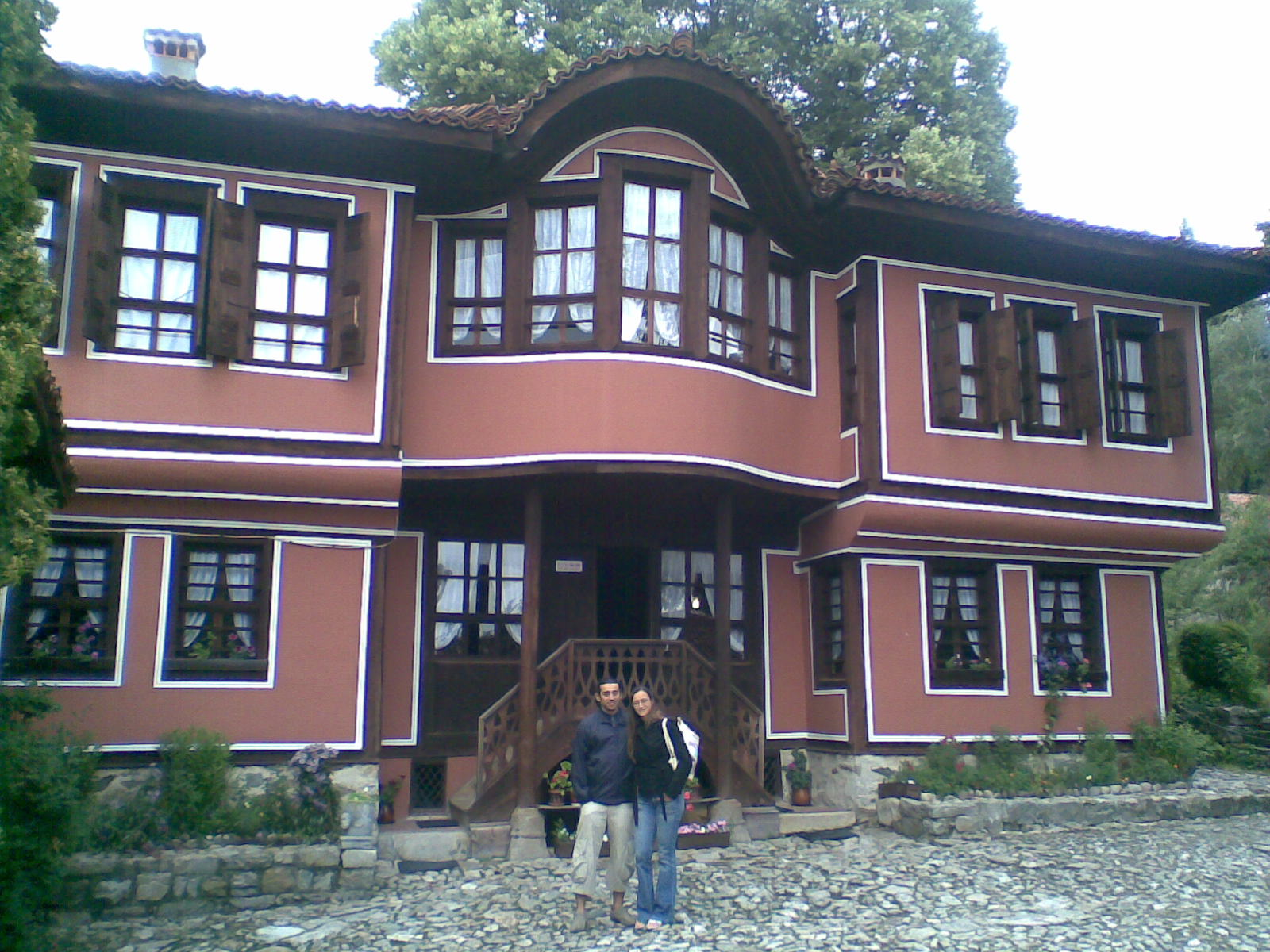 la casa di Kableshkov